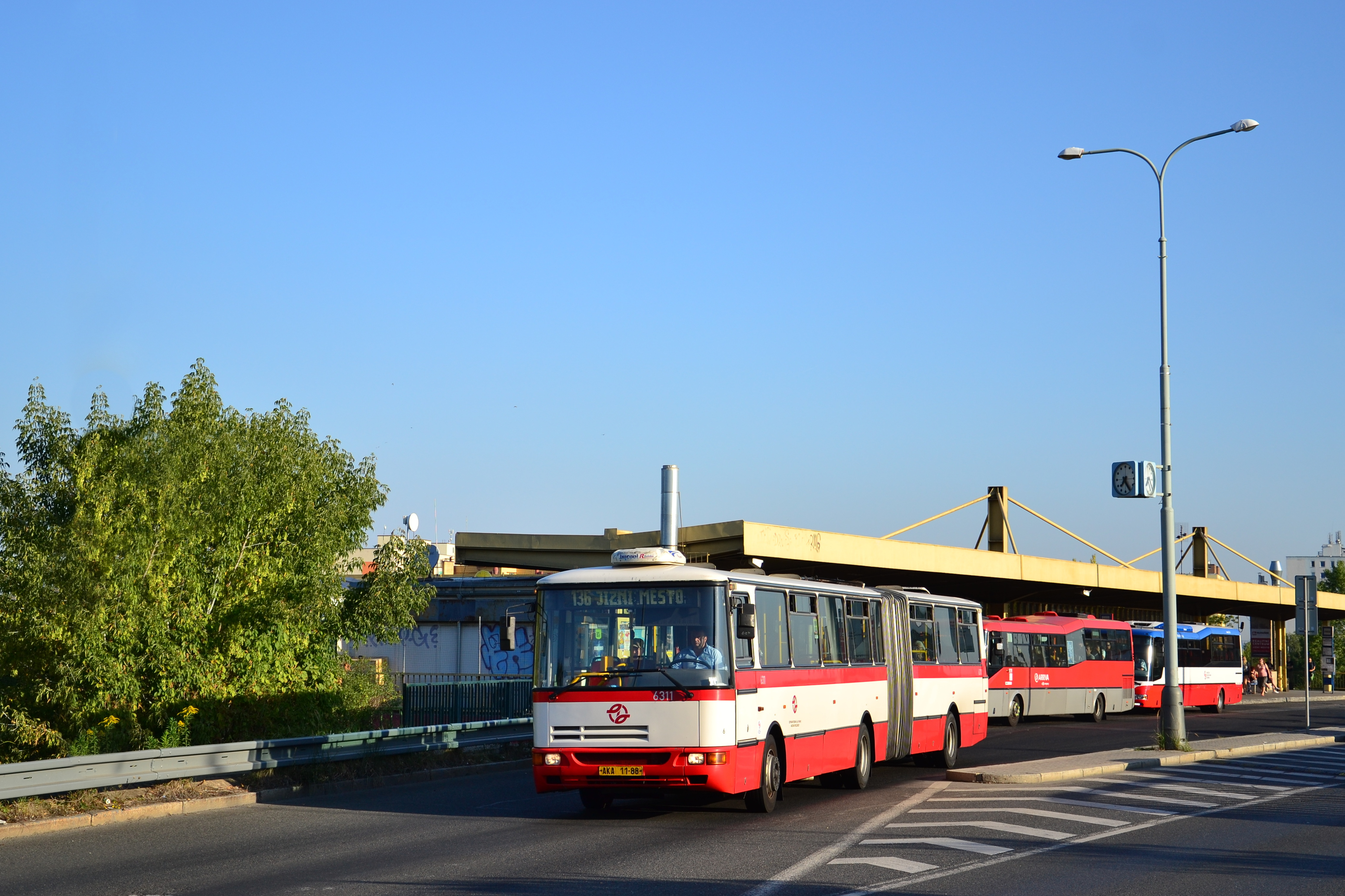 Autobus linky 136 MHD Praha v zastávce Opatov